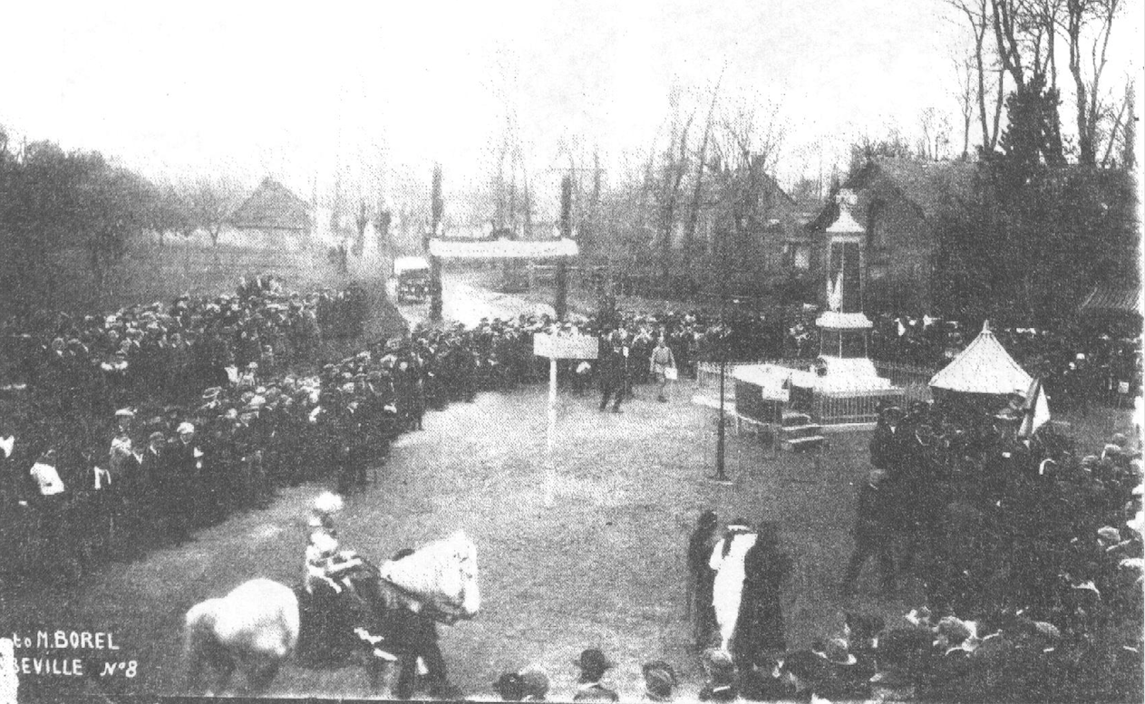 Inauguration du monument d'Acheux-en-Vimeu en 1922, carte postale d'un photographe d'Abbeville.